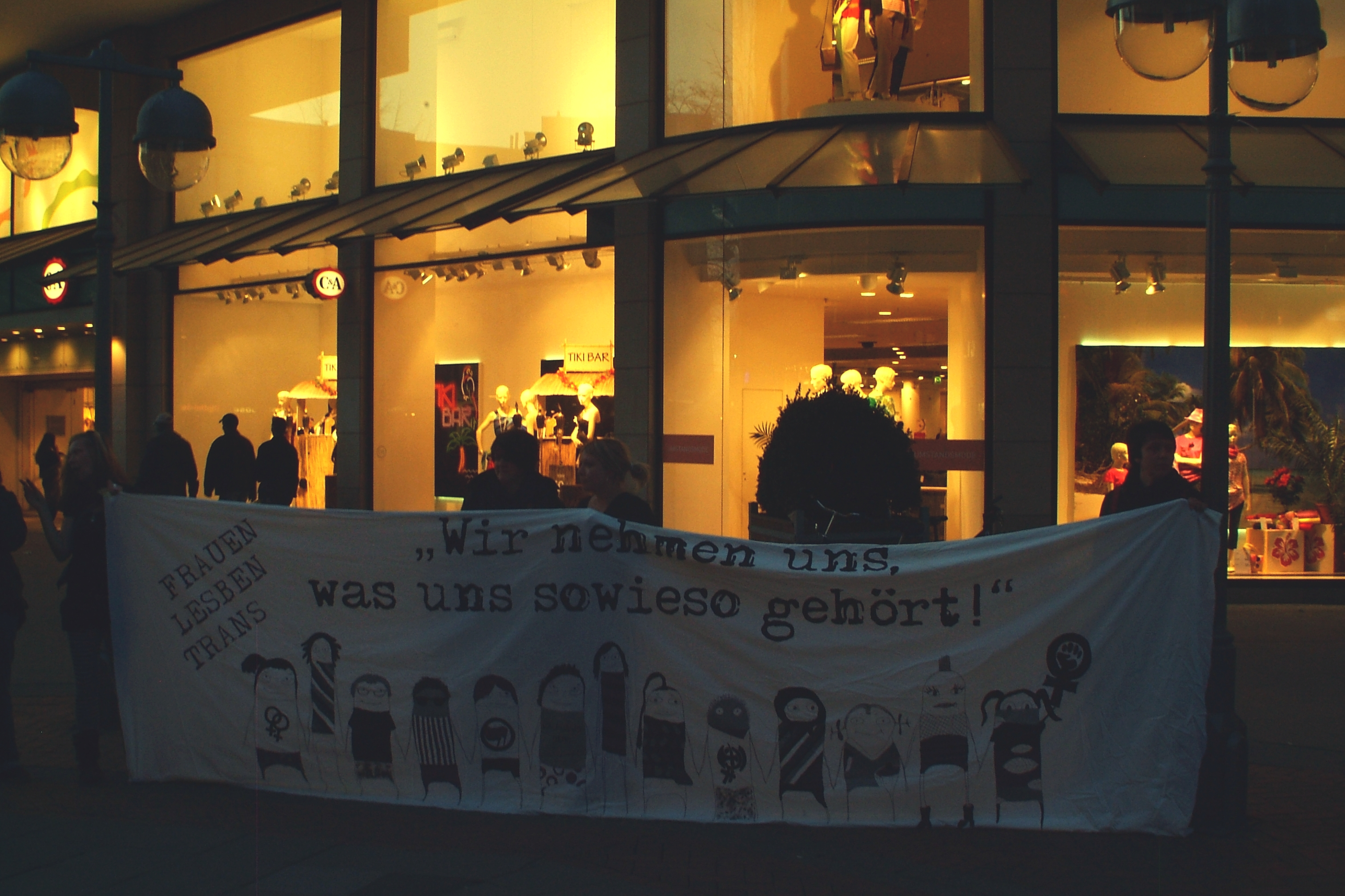 Transparent anläßlich der InterKoneXiones 2012 in Hannover mit der Aufschrift "Frauen Lesben Trans - Wir nehmen uns, was uns sowieso gehört.